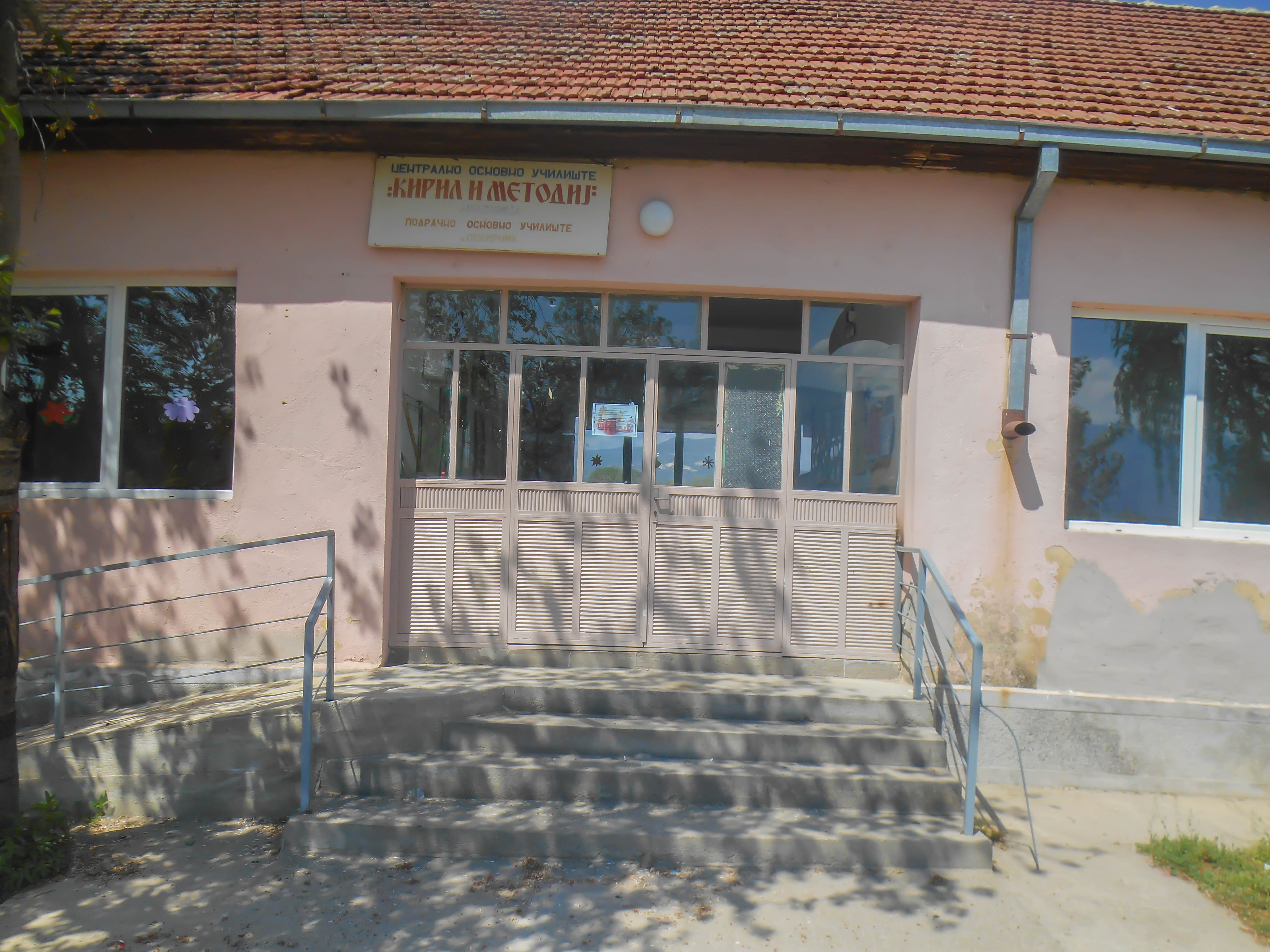 Основно училиште „Св. Кирил и Методиј“ - Секирник